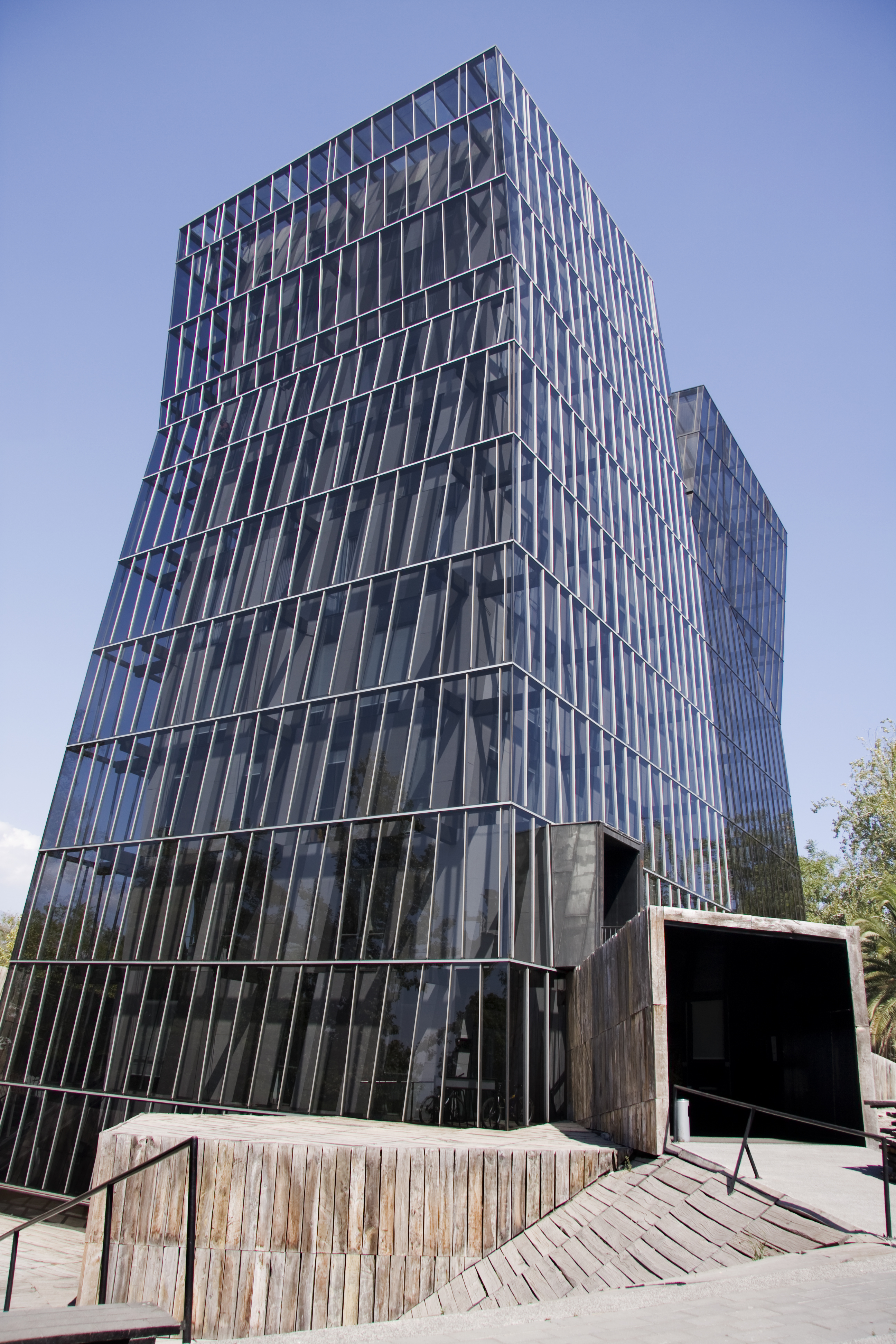 Fotos (cc): Karina Fuenzalida